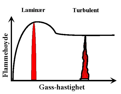 Viser hvordan flammehøyden enres ved økende gass-strøm, men ved konstant diameter på åpning